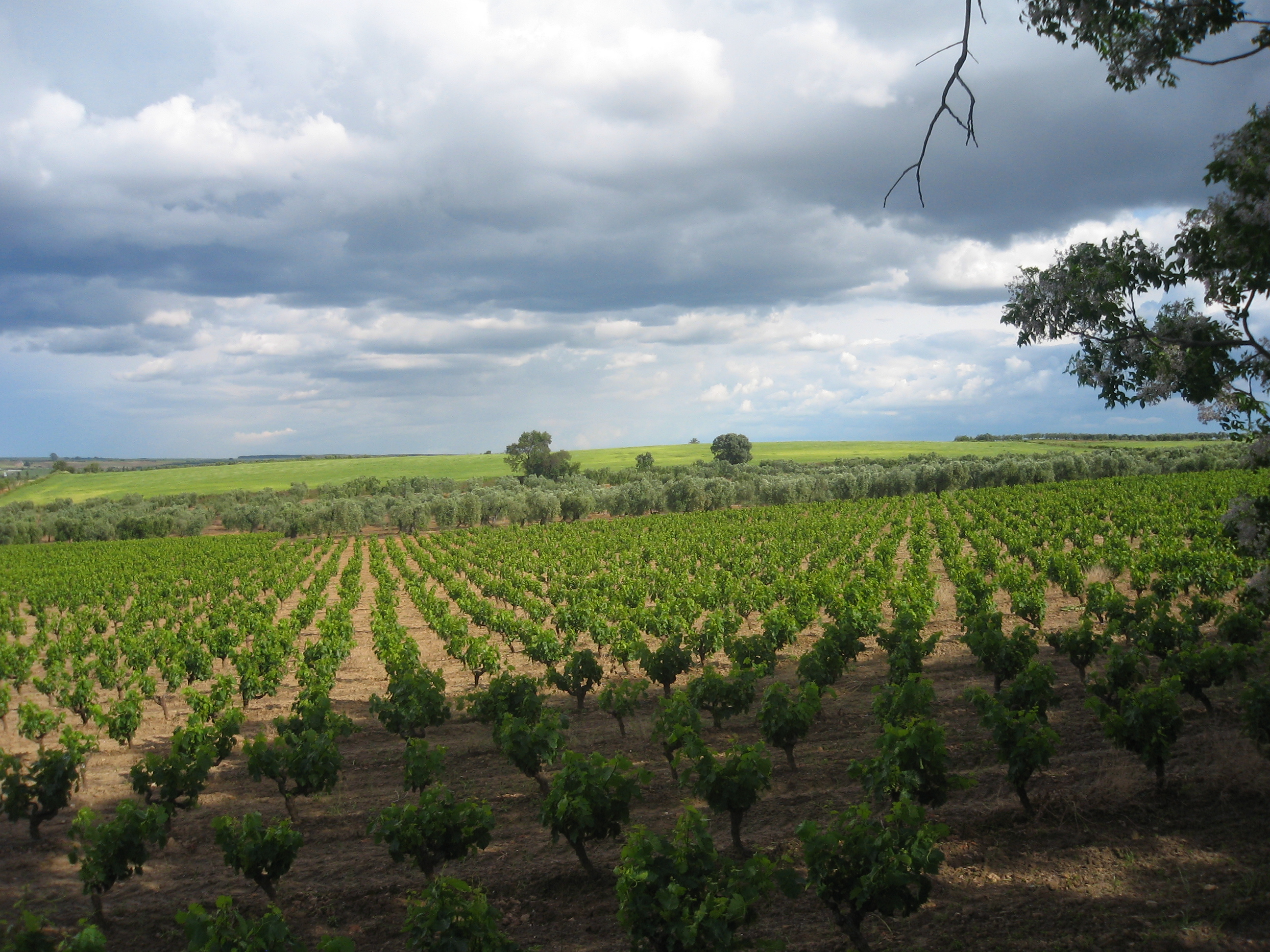 Campos de Bollullos Par del Condado desde la ermita de la Ntra. Sra. de las Mercedes. Tríada o triología mediterránea